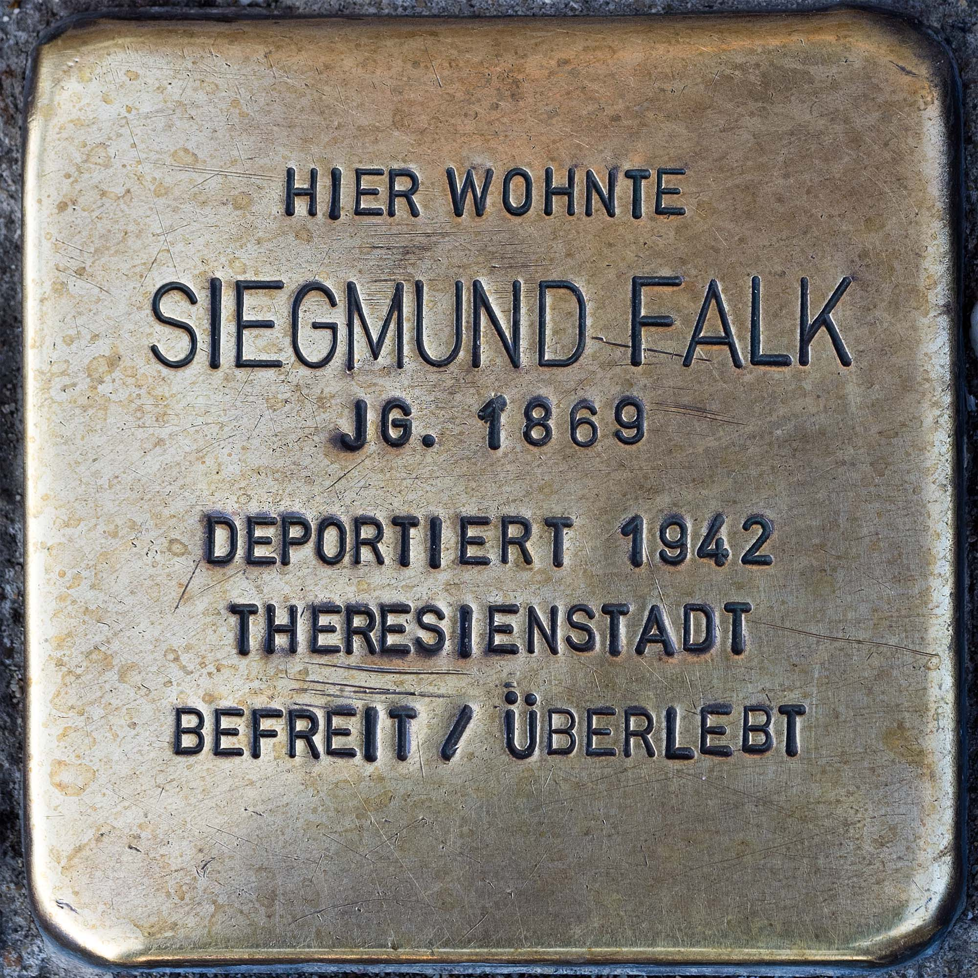 2016 Stolpersteine Toevo Siegmund Falk